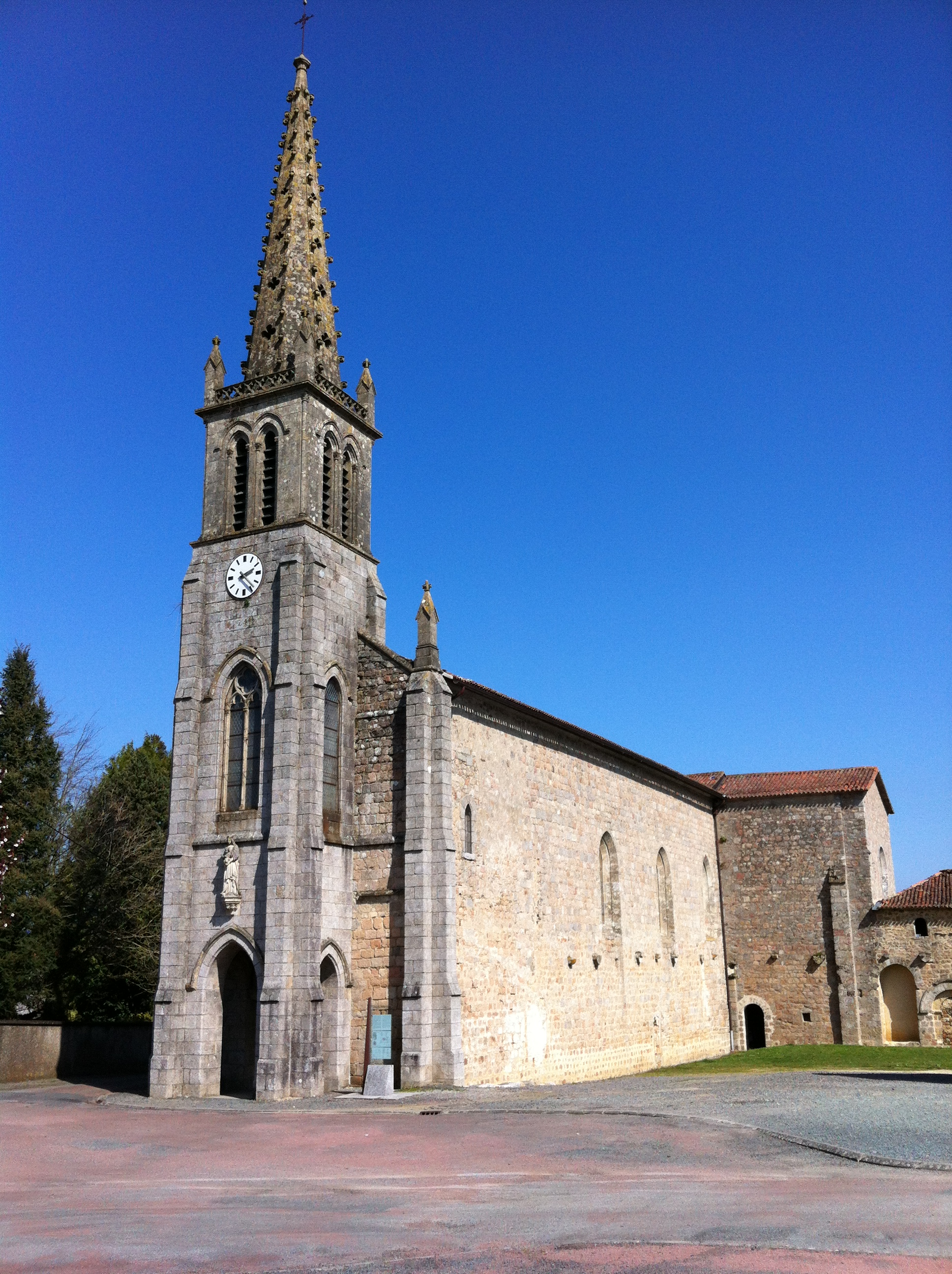 Abbatiale Notre-Dame de L'Absie